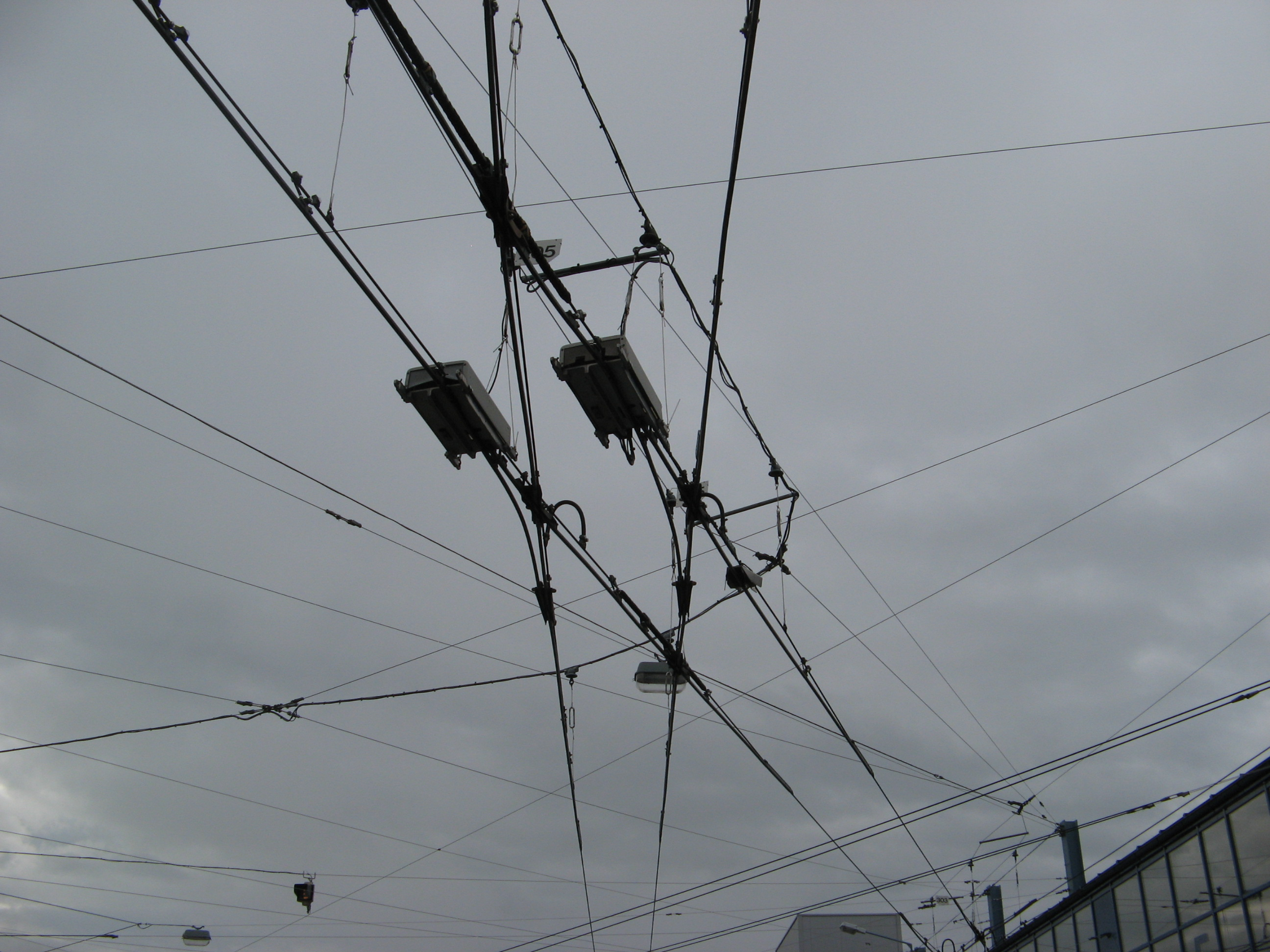 O-Bus Oberleitungsweiche, Auslaufweiche (Spurtrennung)